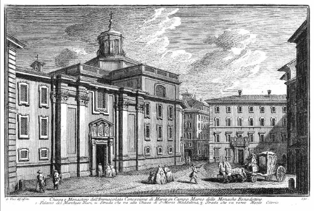 Prospetto della Chiesa di Santa Maria in Campo Marzio